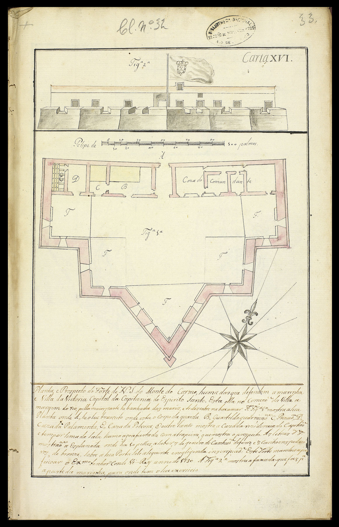 VILHENA, Luís dos Santos. Planta, e prospecto do Forte de N. S. do Monte do Carmo. [S.l.: s.n.], 1801. 1 planta mss, il. col. Disponível em: . Acesso em: 21 jan. 2017.